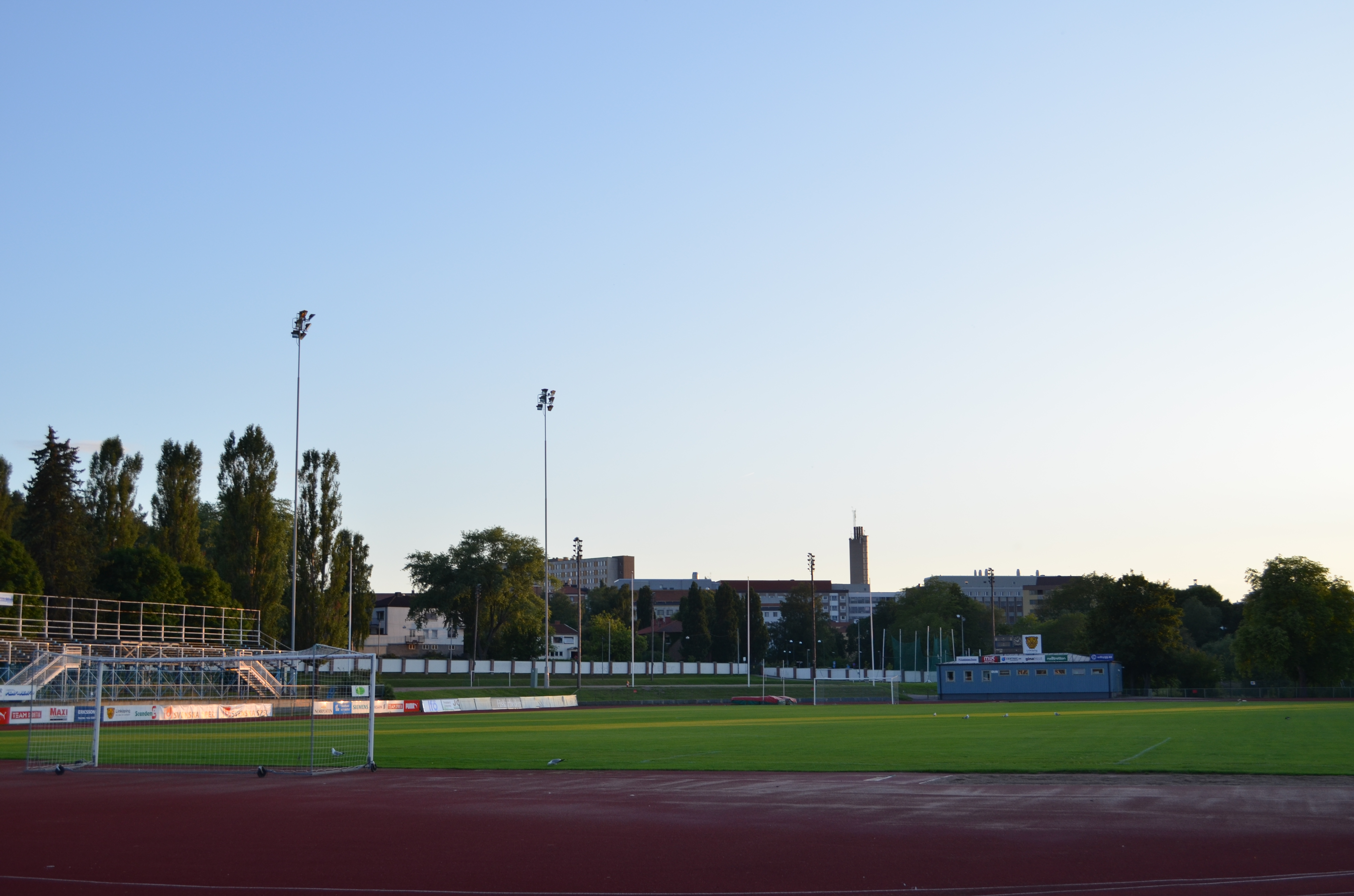 Folkungavallen i Linköping fotograferad under Kruosio och Mannen av börds sightseeing i Linköping. I bakgrunden syns sjukhusets skorsten.